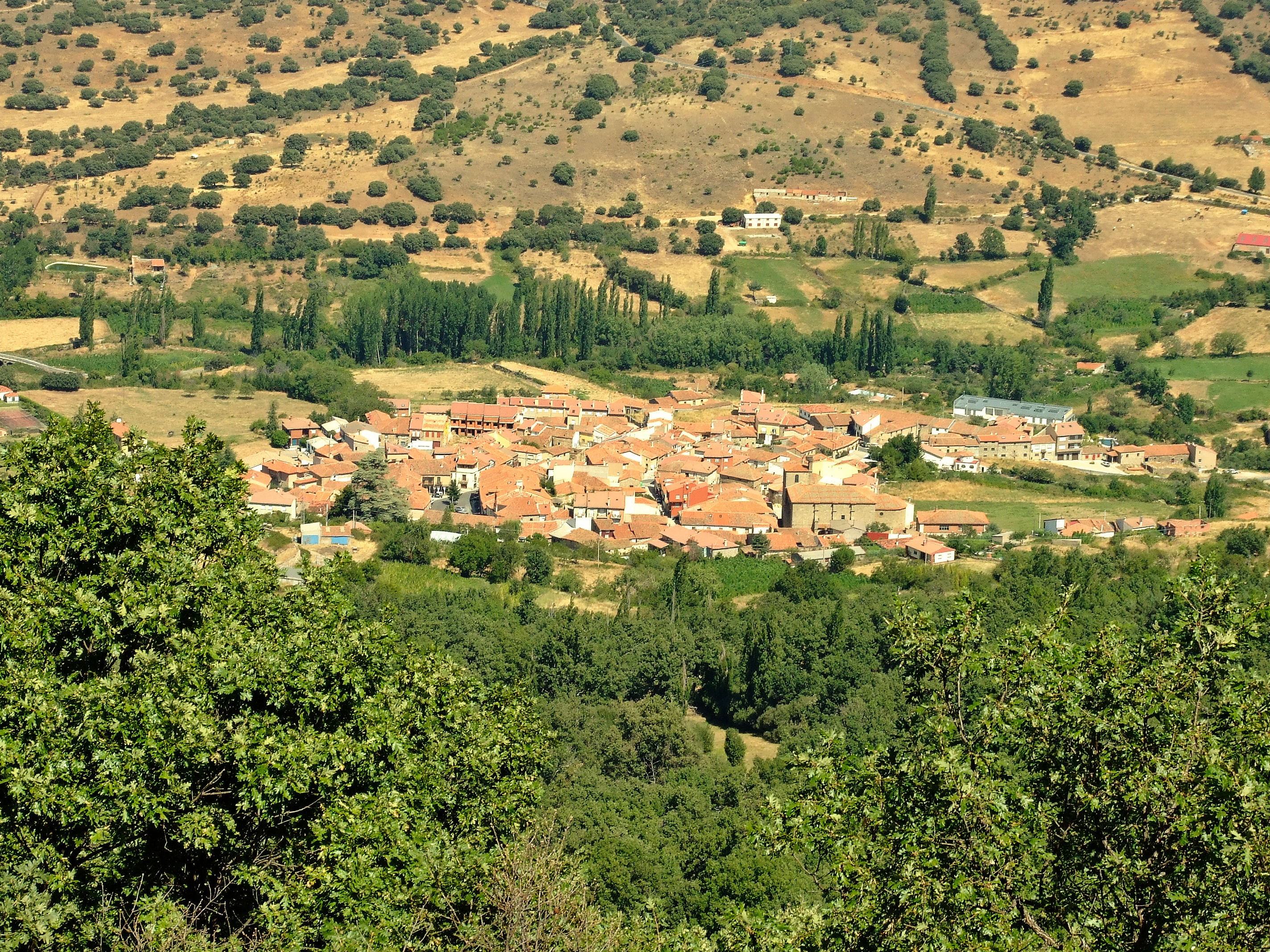 VISTA DE VILLAFRANCA DE LA SIERRA DESDE LA CRUZ. Tomada desde la Sierra de Villafranca.